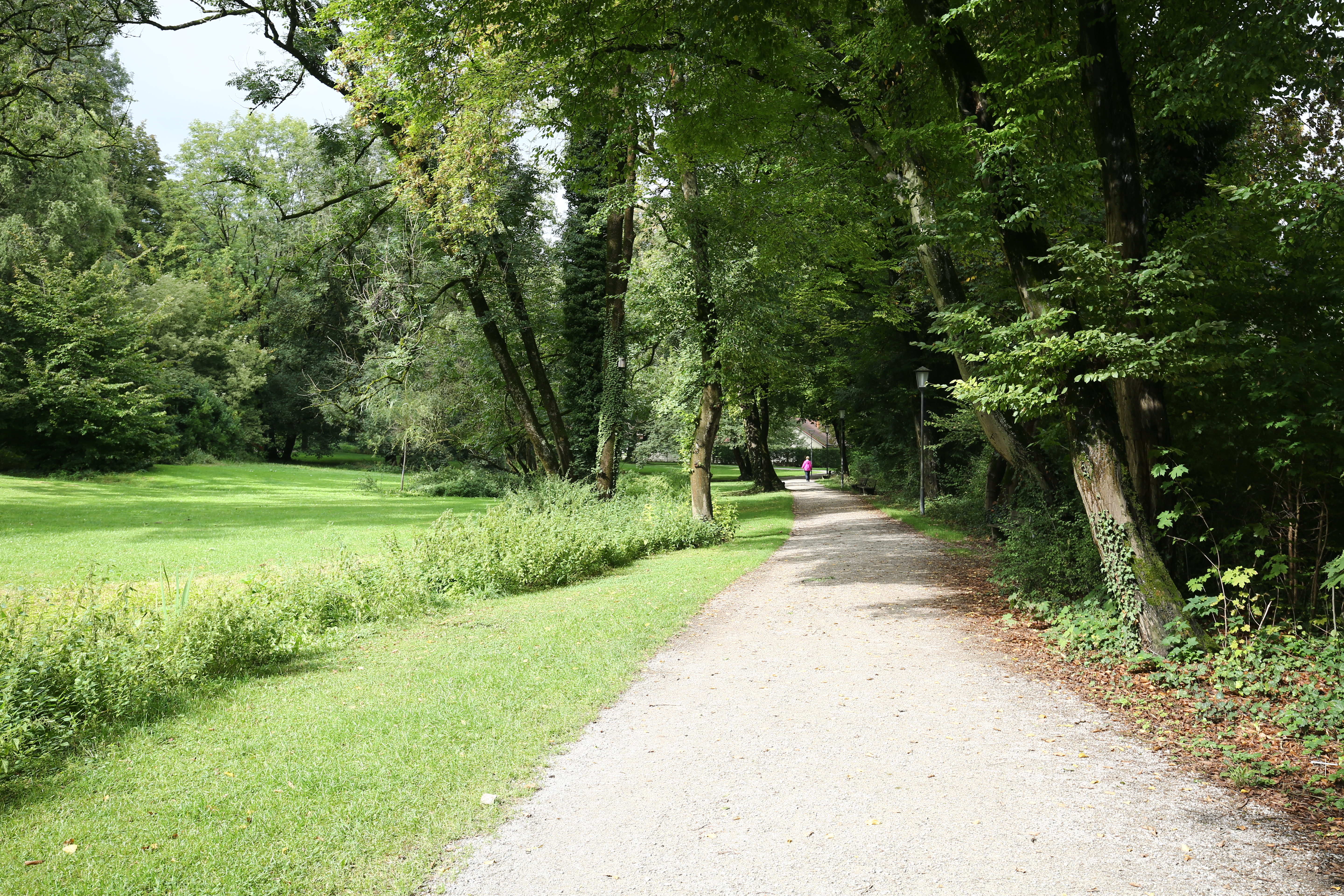 Der Gierlinger Park ist eine städtische Grünanlage im Münchner Stadtteil Thalkirchen. Er entstand Ende des 19. Jahrhunderts als private Vergnügungsstätte und wurde 1965 zum öffentlichen Park.